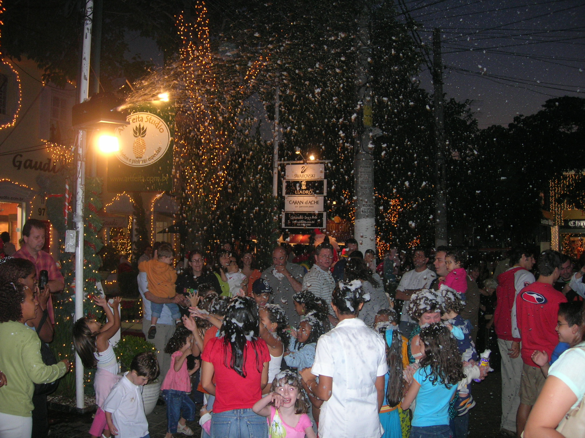 Foto feita por mim. Rua Normandia no Natal de 2005.